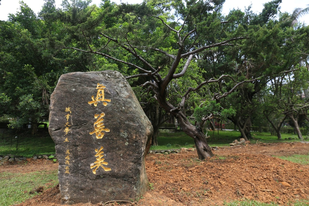 台灣詩書畫名家廖俊穆題字「真善美」石碑。